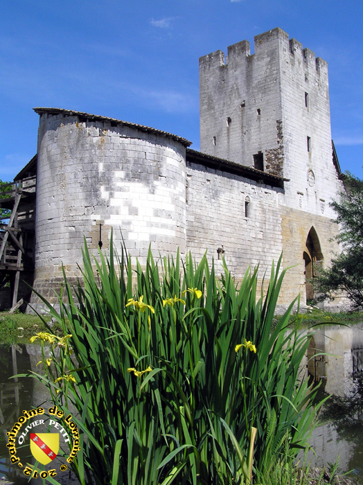 vue extérieure de la tour sud est